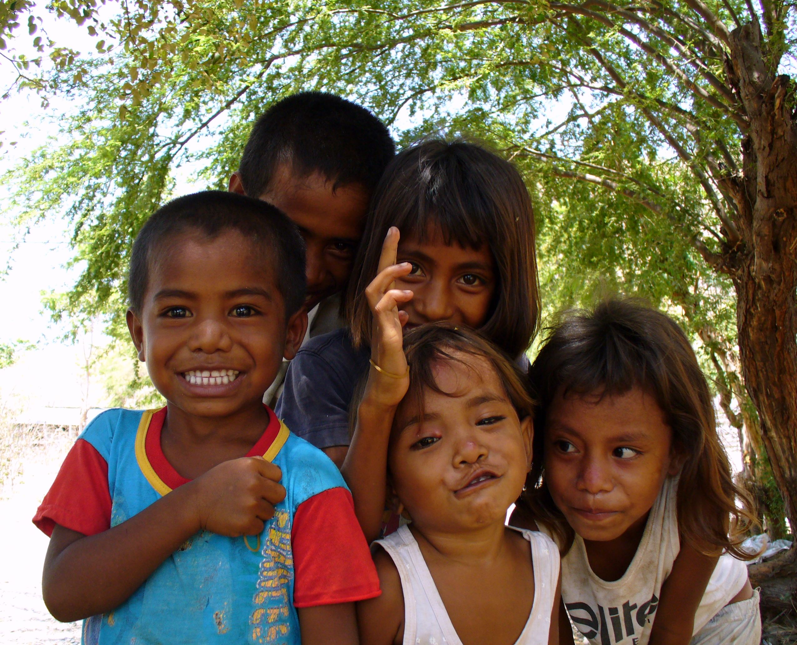 Dili, East Timor